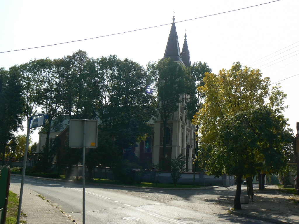 Zabytkowy kościół pw. Wszystkich Świętych w Grocholicach (Bełchatów)